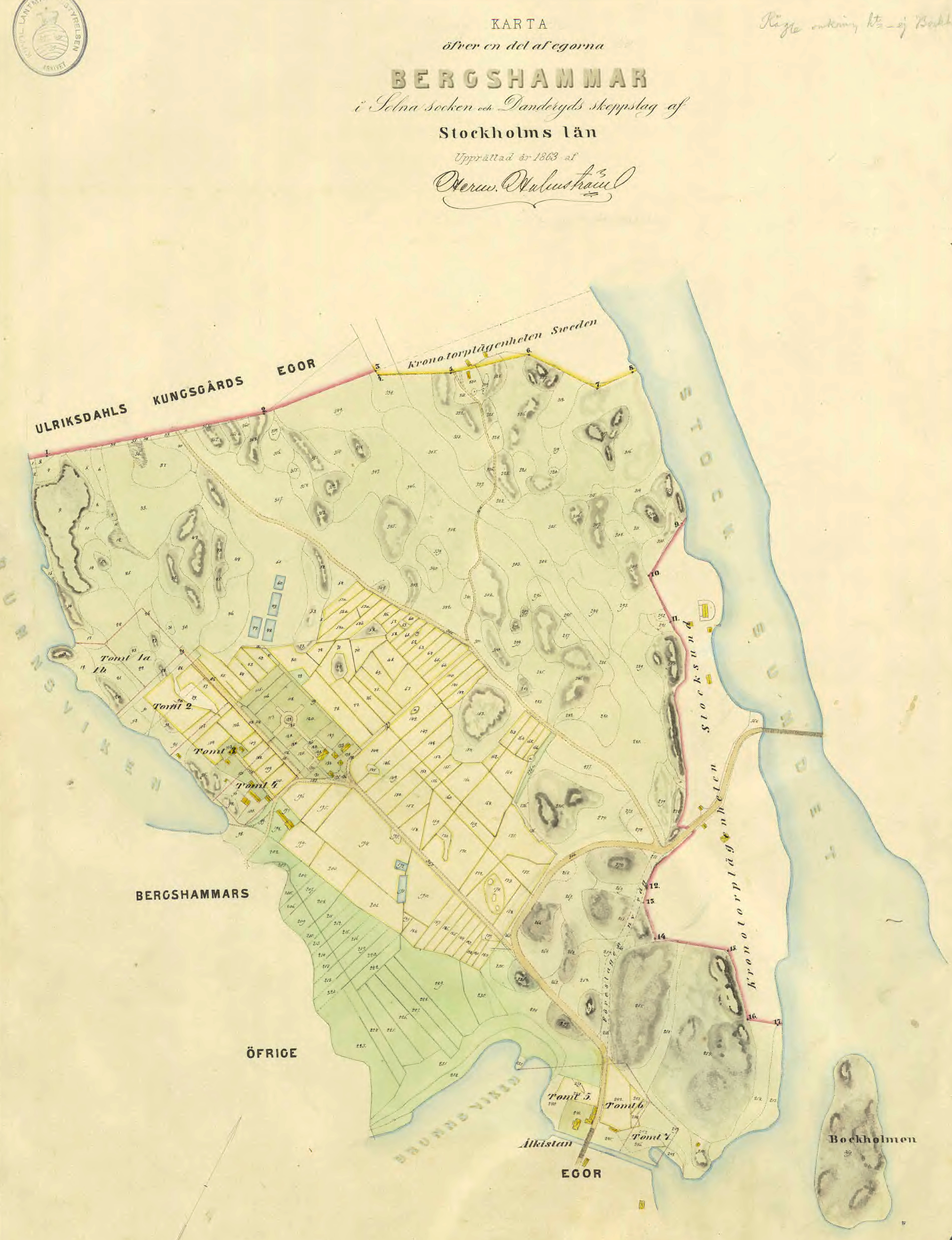 Karta över en del av ägorna Bergshammar i Solna socken.